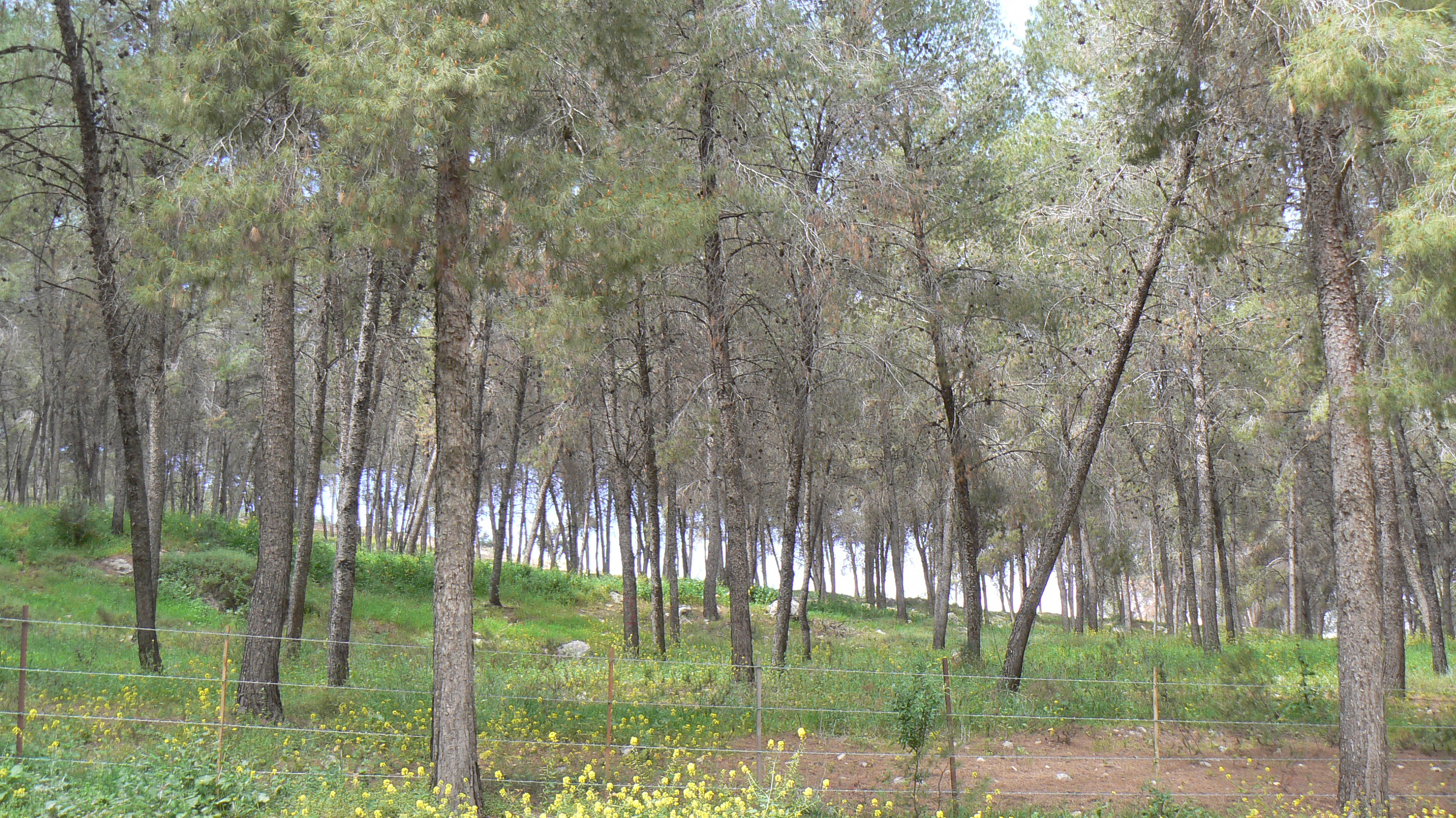 פה יער, שם לא. Mount Gilboa